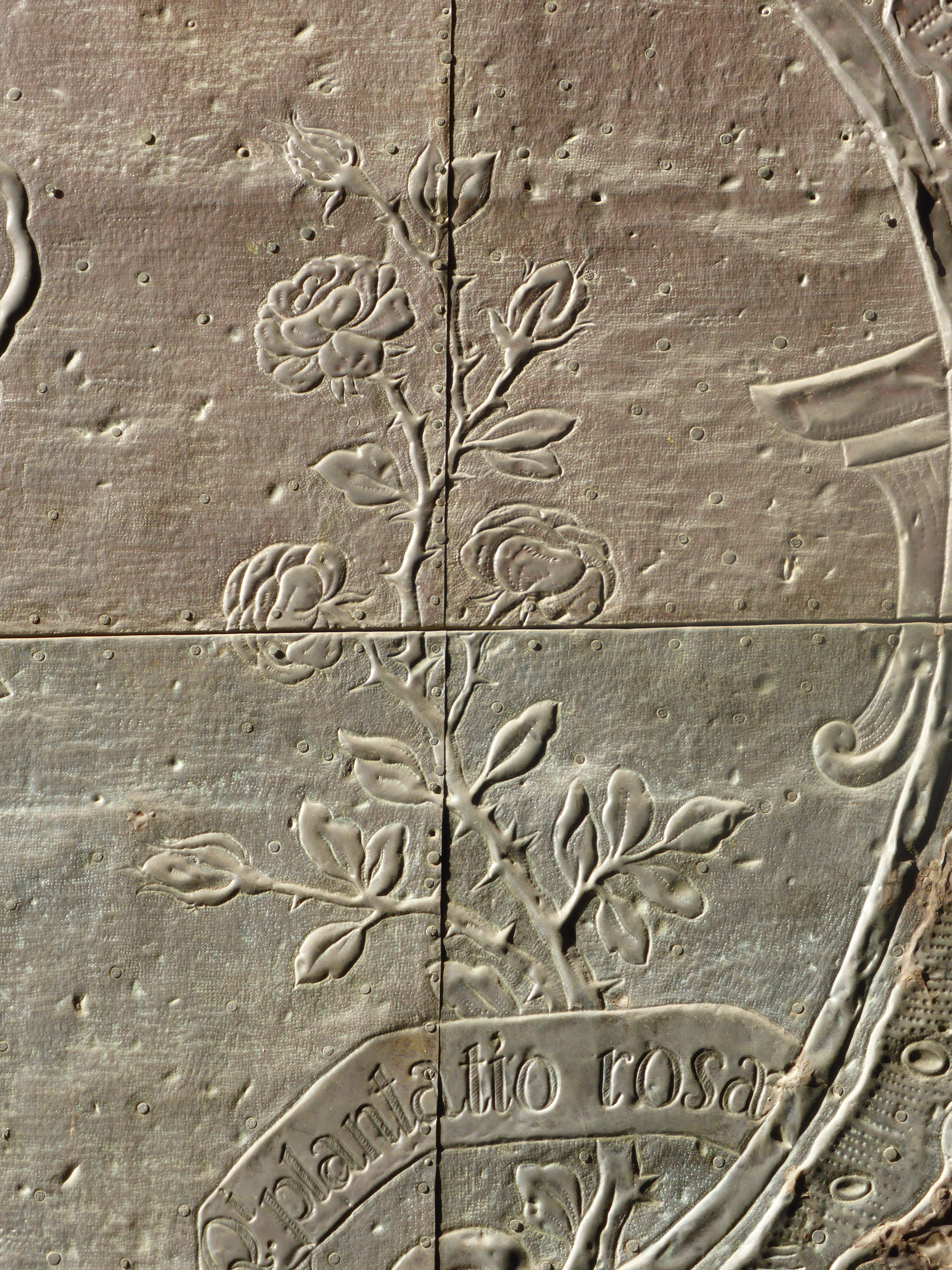 Representación de un rosal, con inscripción: "Qi. plantatio rosa" (plantar rosas). Detalle de una hoja de la puerta principal de la catedral de Valencia. Está en la puerta de entrada de la llamada Puerta de los Hierros.